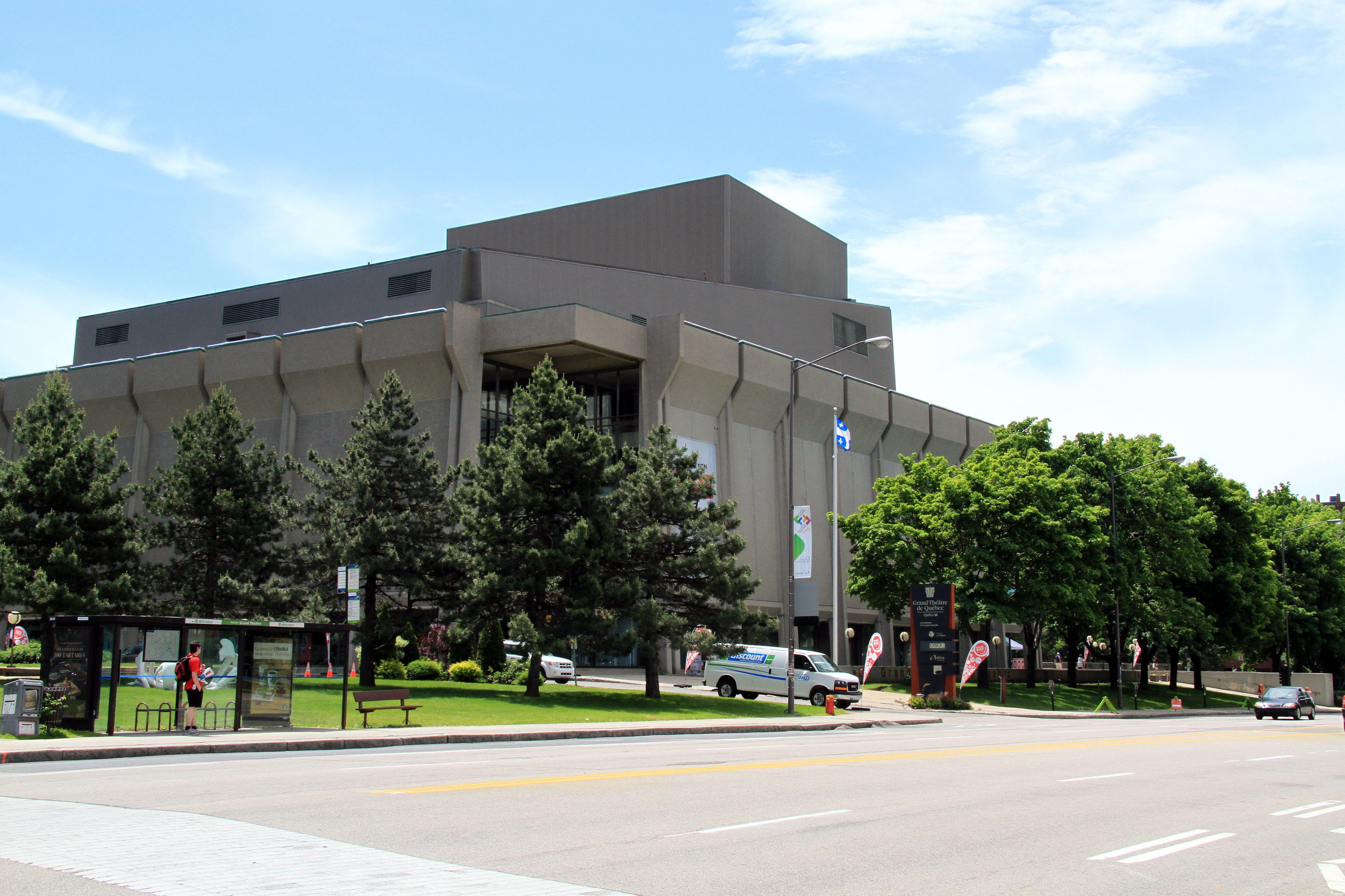 Grand Théâtre de Québec, vu de l'intersection René-Lévesque et Claire-Fontaine.